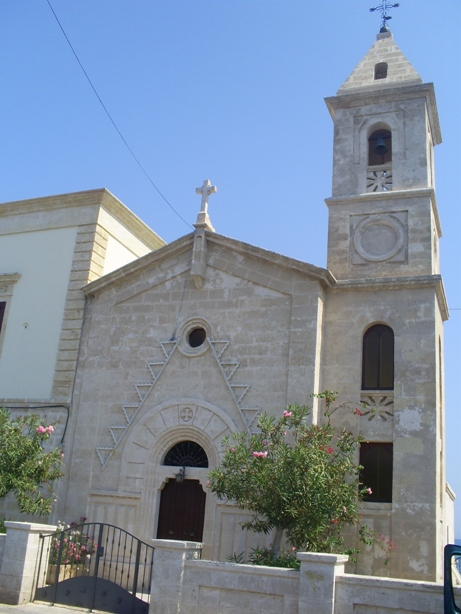 Chiesa San Francesco da Paola - Savelletri di Fasano (BR)